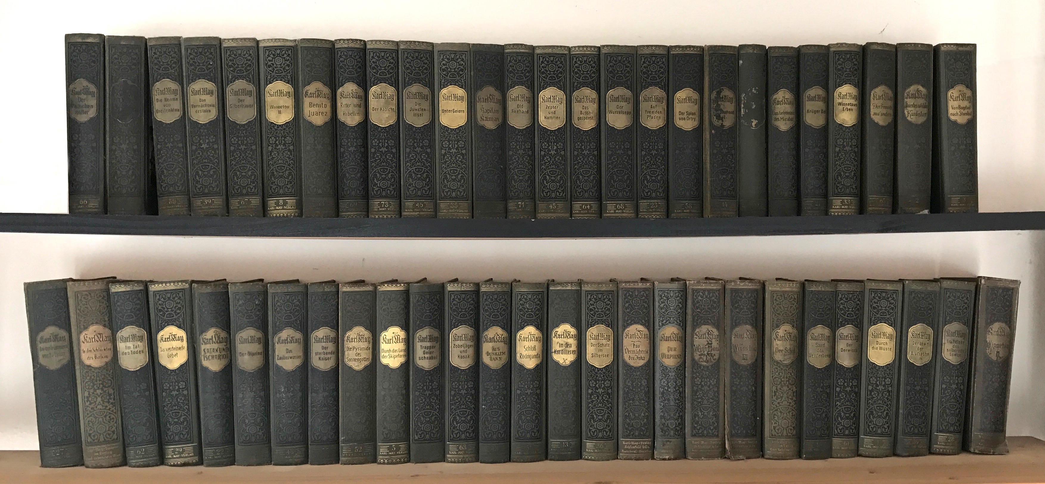 Karl May-Bücher